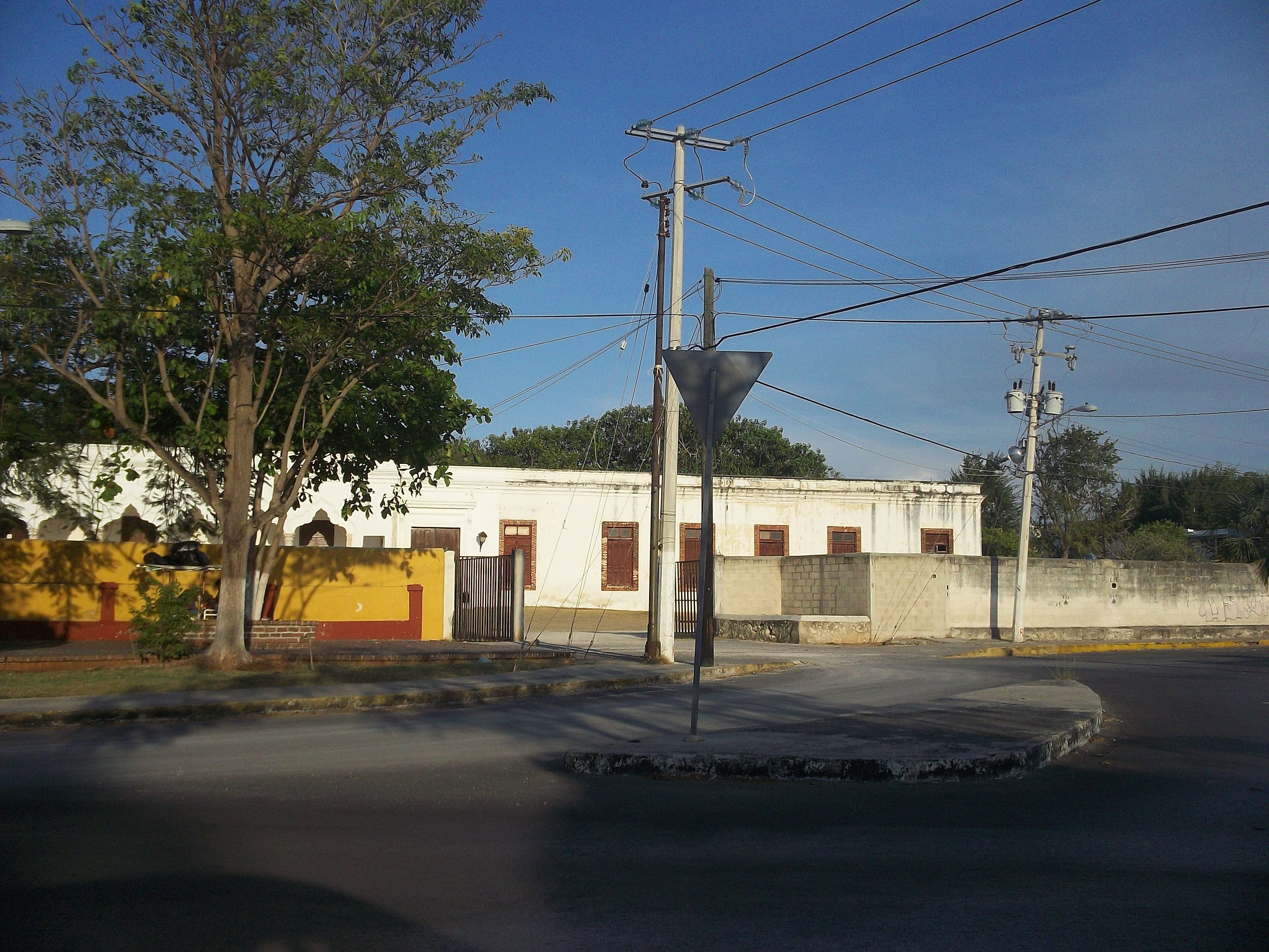 Hacienda San Pedro Chukuaxín, Yucatán.